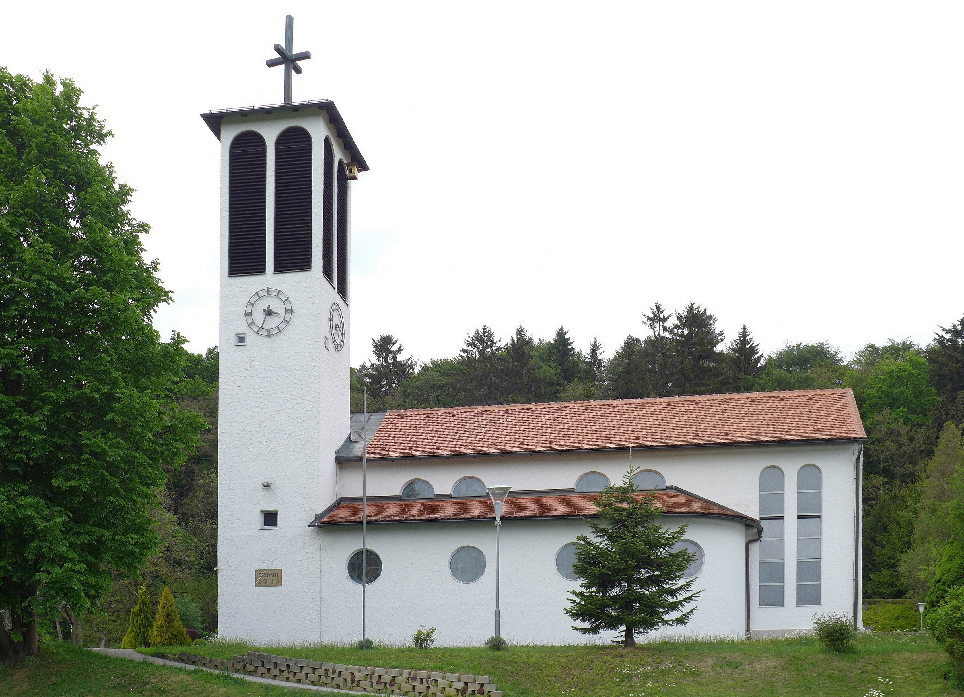 Autaler Kirche, Außenansicht (2020)